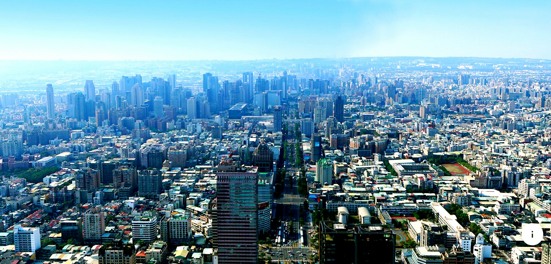 台灣大道Taiwan Boulevard